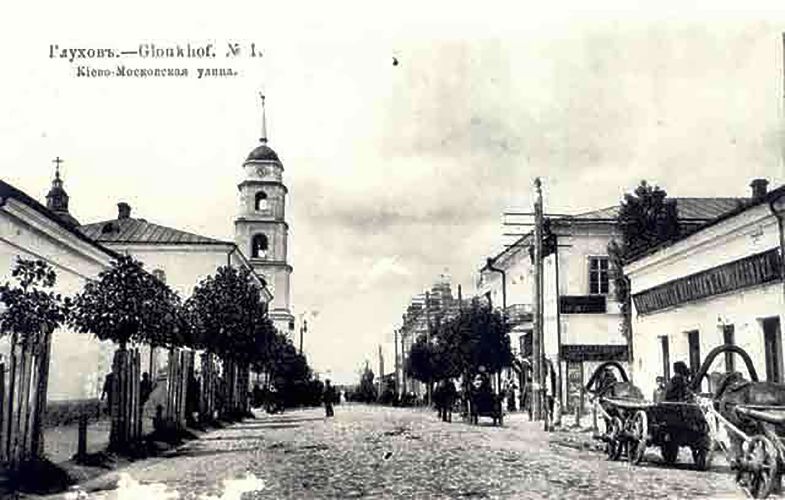 Дзвіниця Троїцького собору (східний фасад) наприкінці 19 ст.